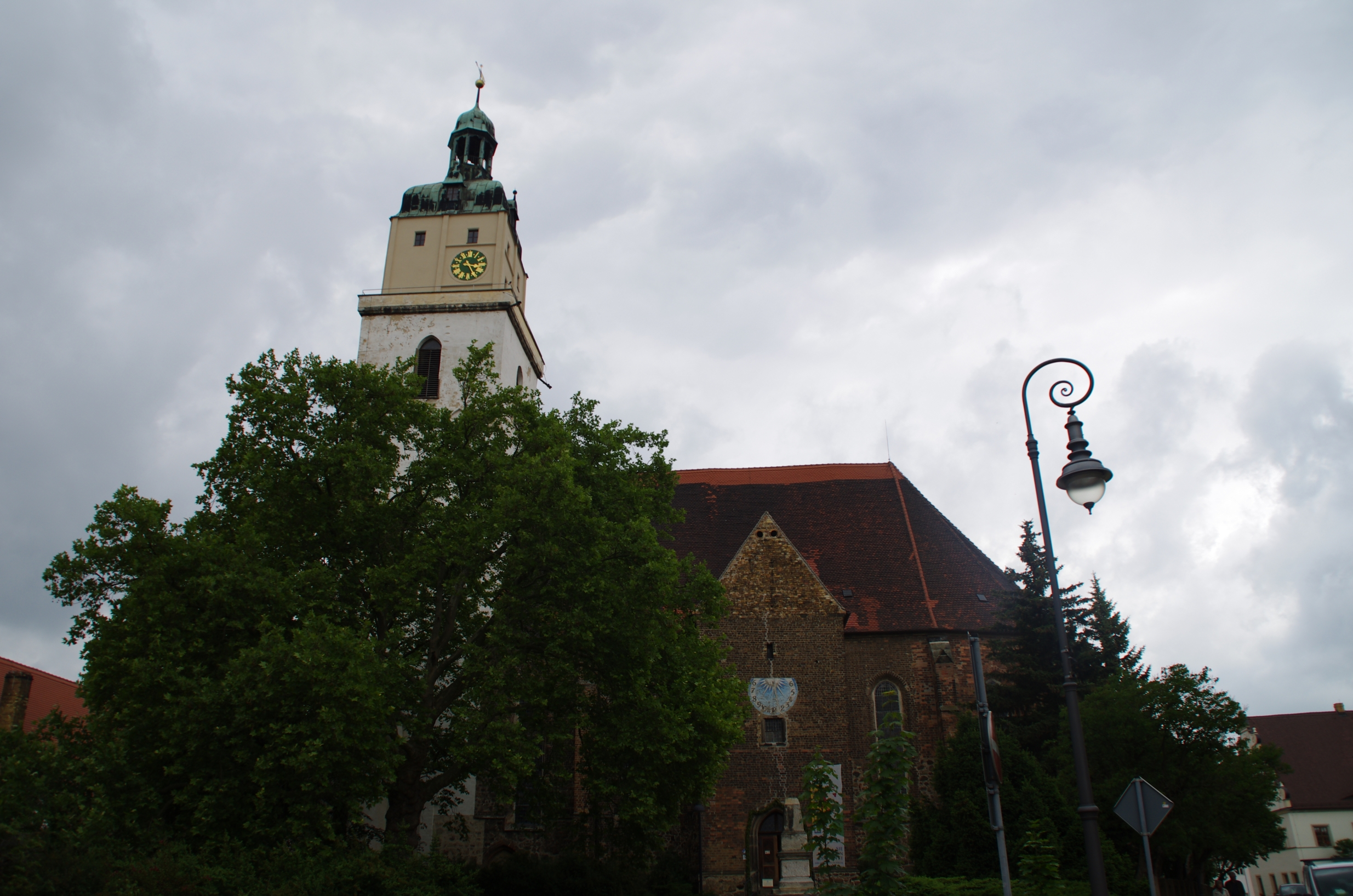 Bad Schmiedeberg in Sachsen-Anhalt. Die Nikolaikirche steht unter Denkmalschutz. Die Kirche von Süden aus.